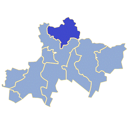 Powiat żagański - Gmina Brzeźnica